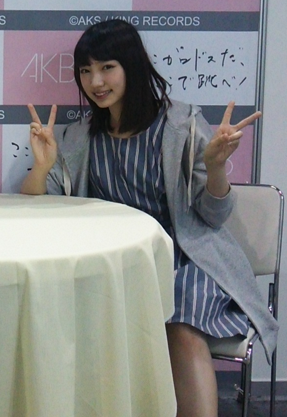 AKB48 6thアルバム「ここがロドスだ、ここで跳べ！」劇場盤発売記念大写真会